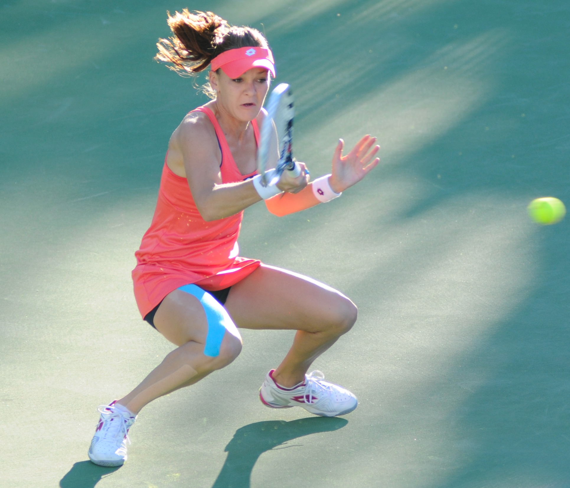 BNP Paribas Open 2013